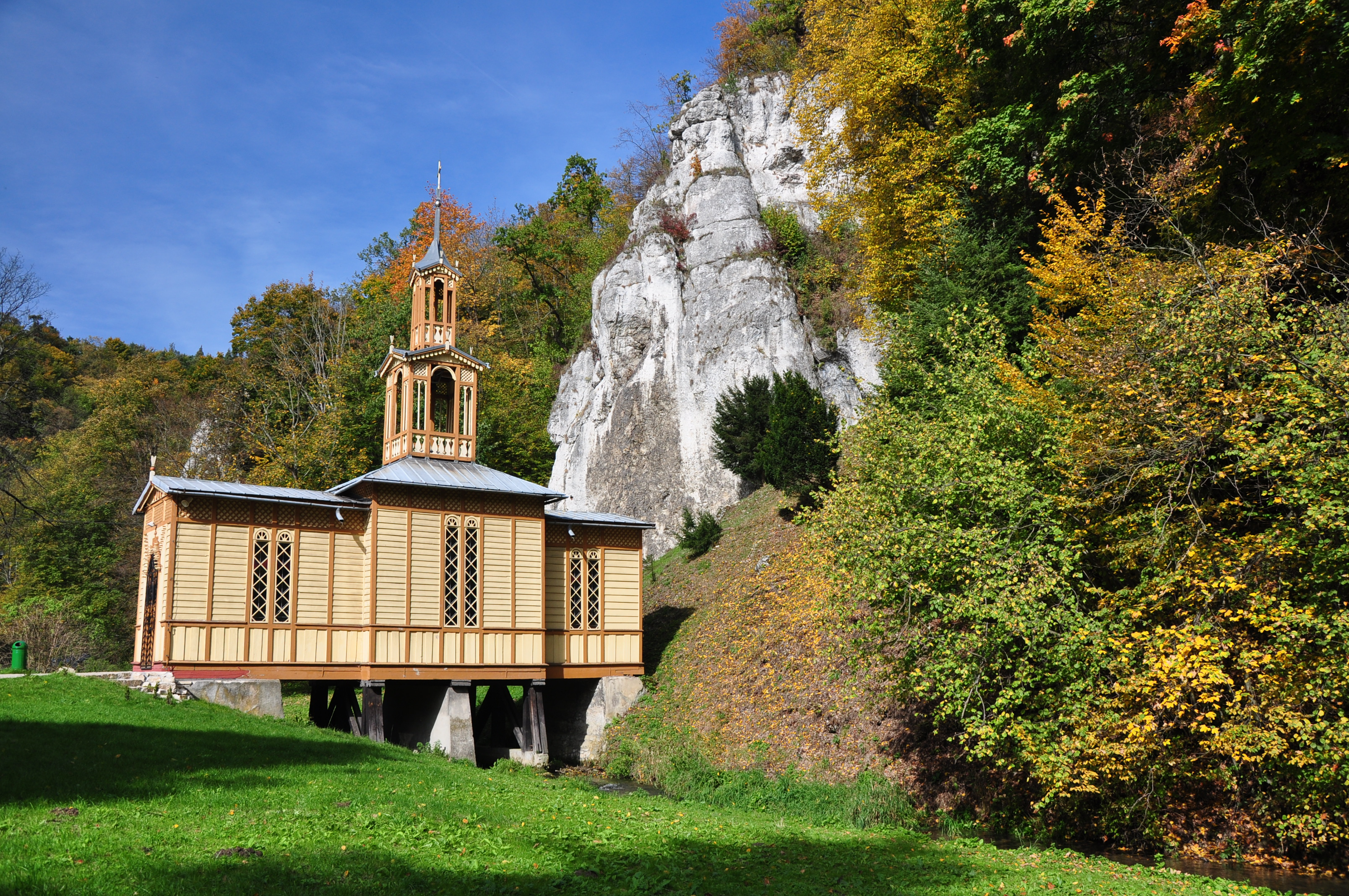 Ojców, kaplica "Na Wodzie" p.w. św. Józefa, 1901